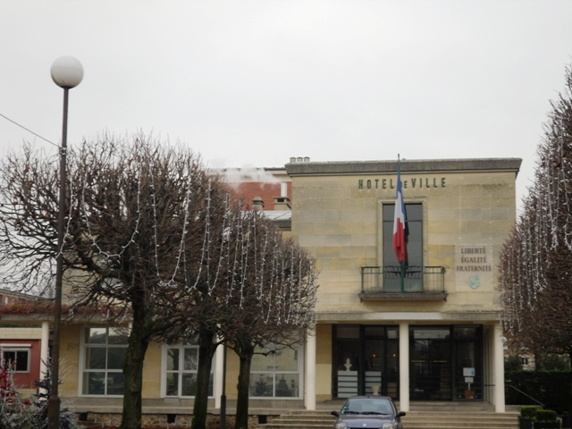 Hôtel de Ville de Morangis (91)